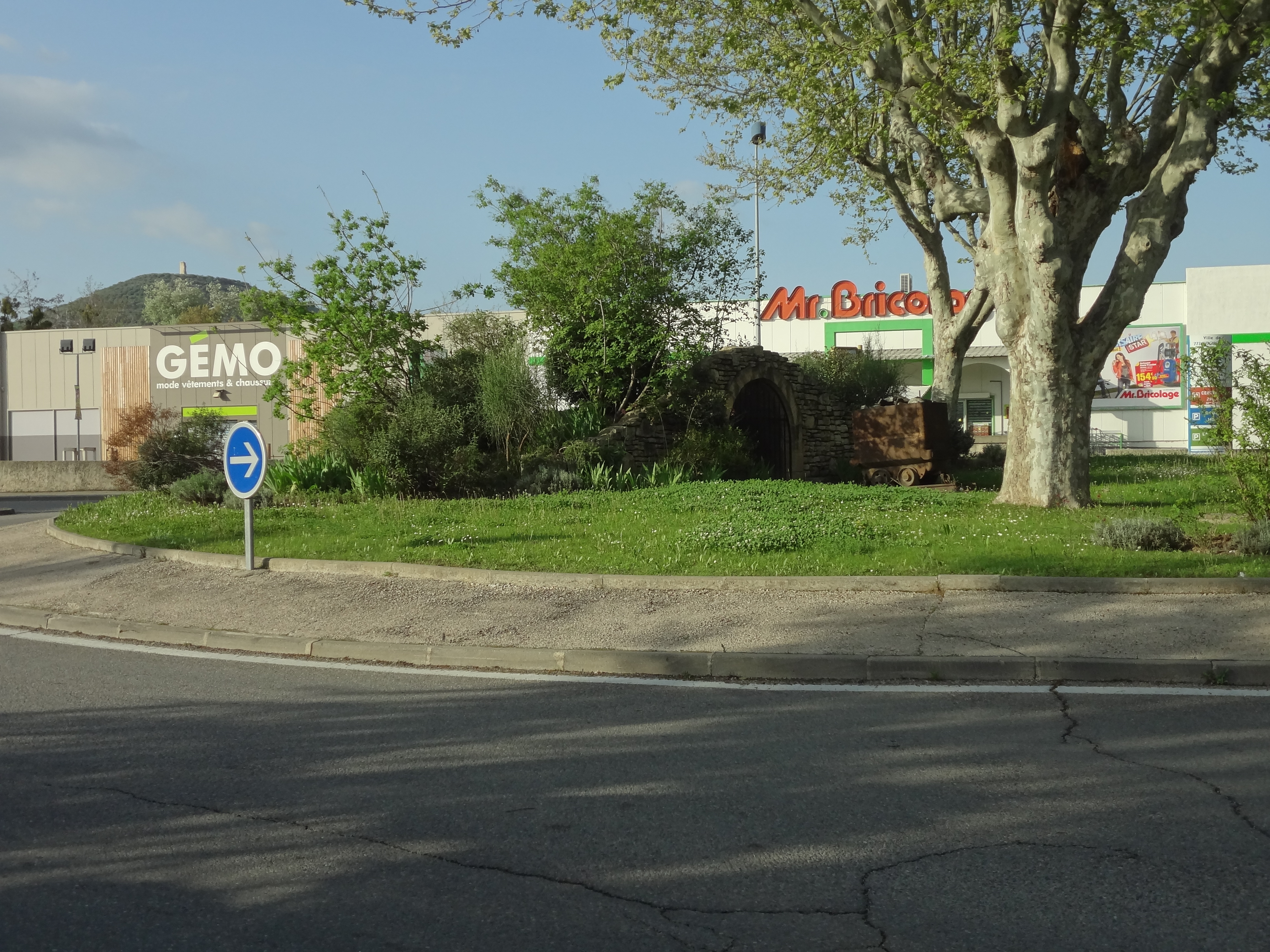 wagonnet sur rond-point à Manosque, hommage à Gaude